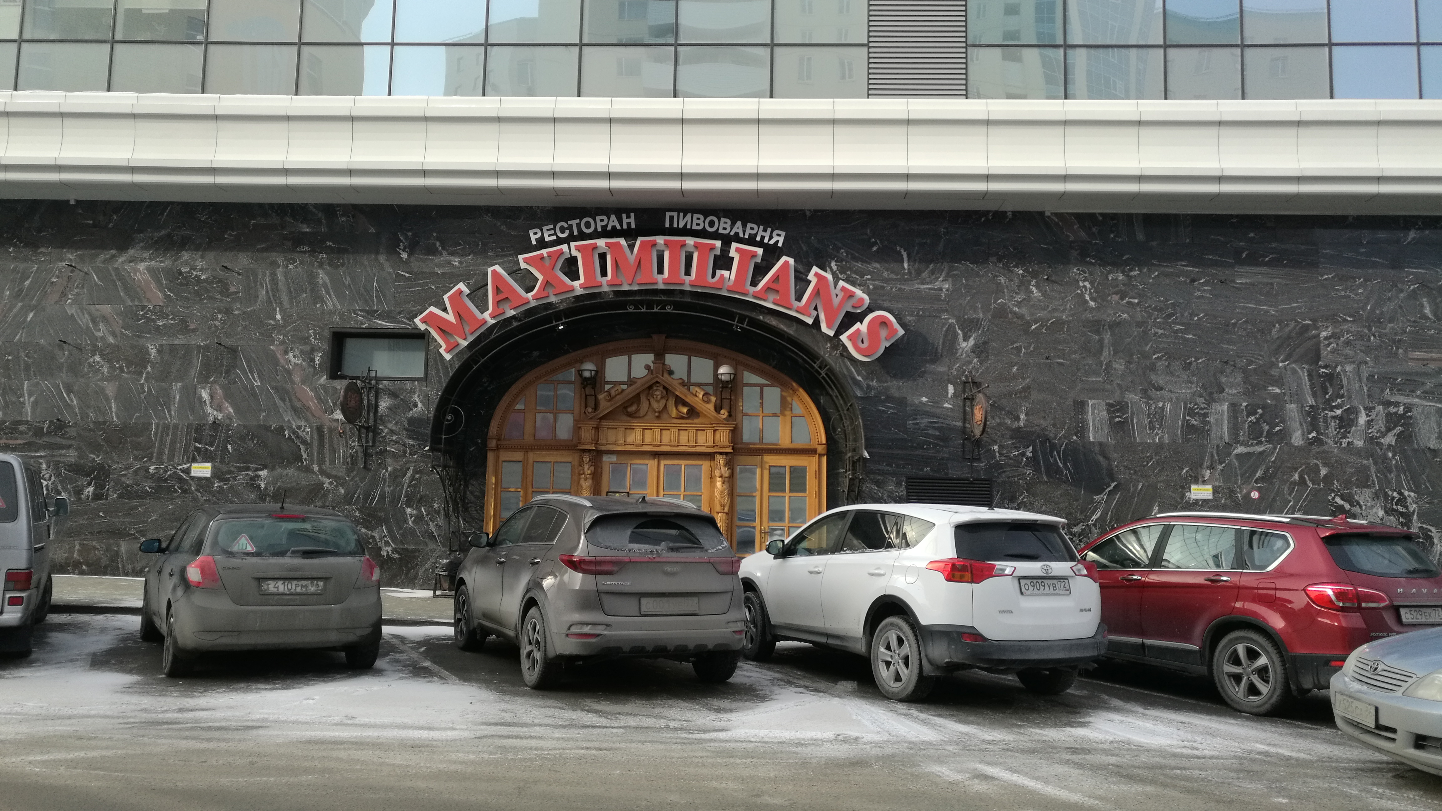 Restoracio Maximilian’s. Tjumeno, Rusio.